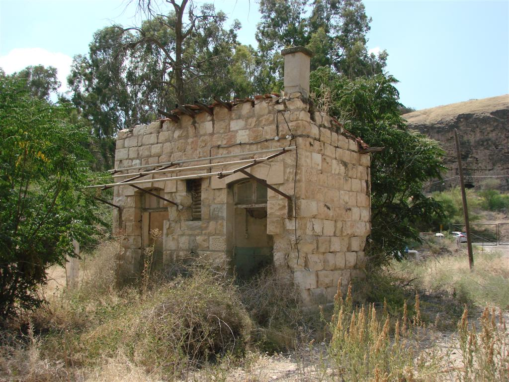 תחנת אל חמה - בניין שרותים